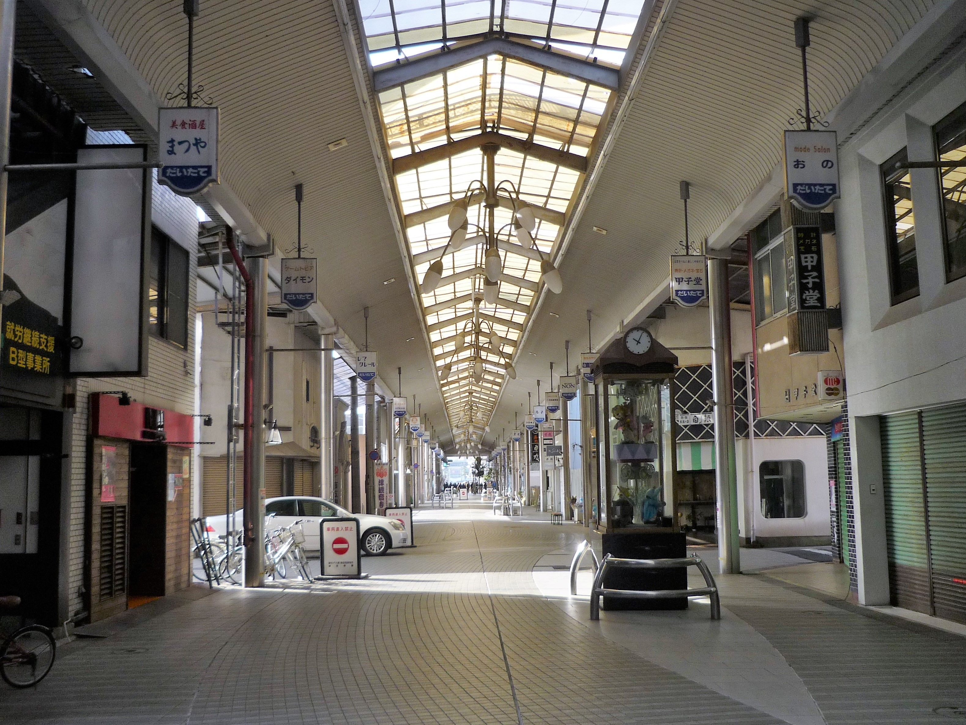 だいたてアーケード街 Panasonic Lumix DMC-FS3